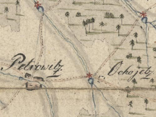 Plik pochodzi z Pobrany ze zbiorów M. Siniec.